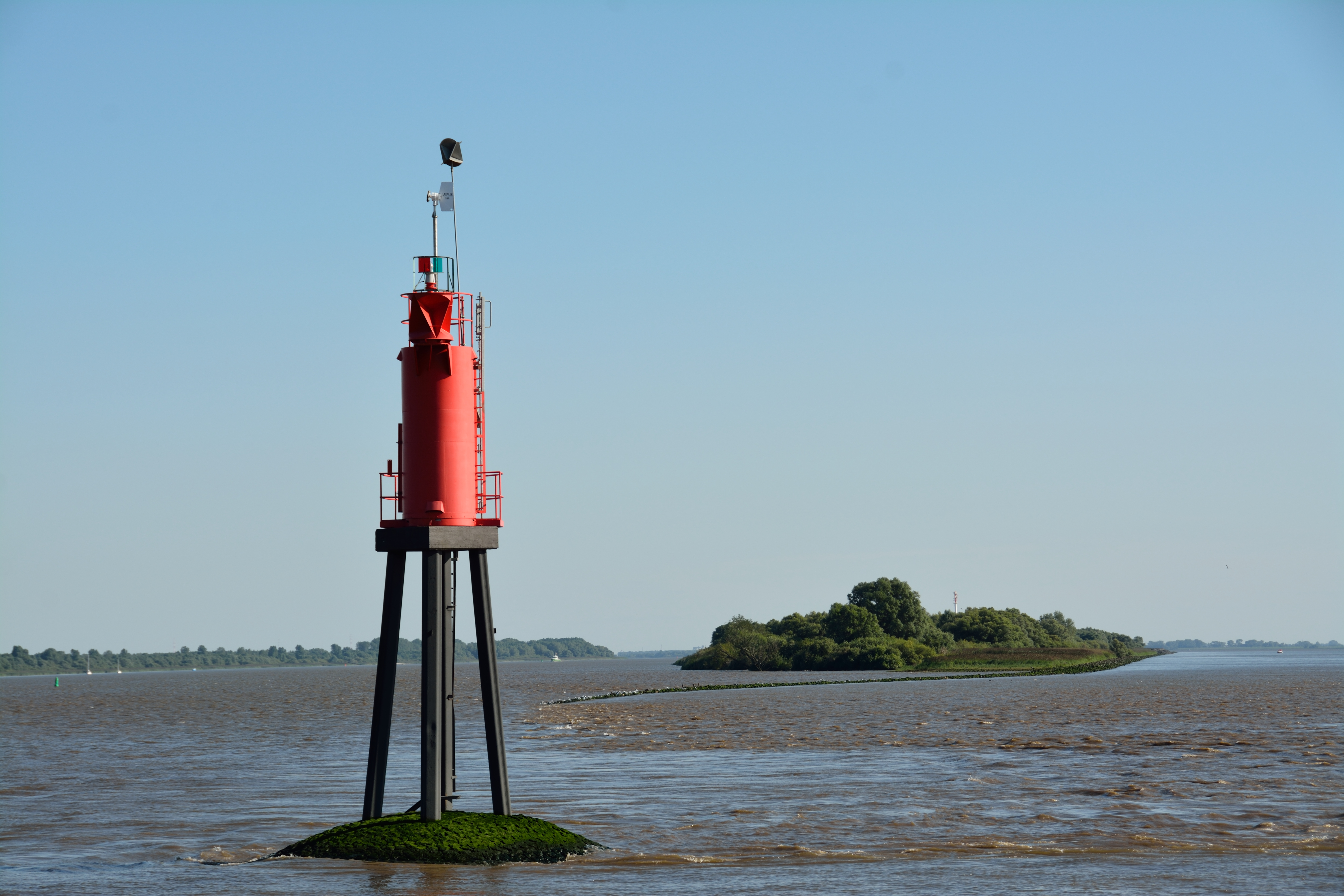 Impressionen einer Hin- und Rückfahrt über die Elbe, Leitfeuer Rhinplate Nord